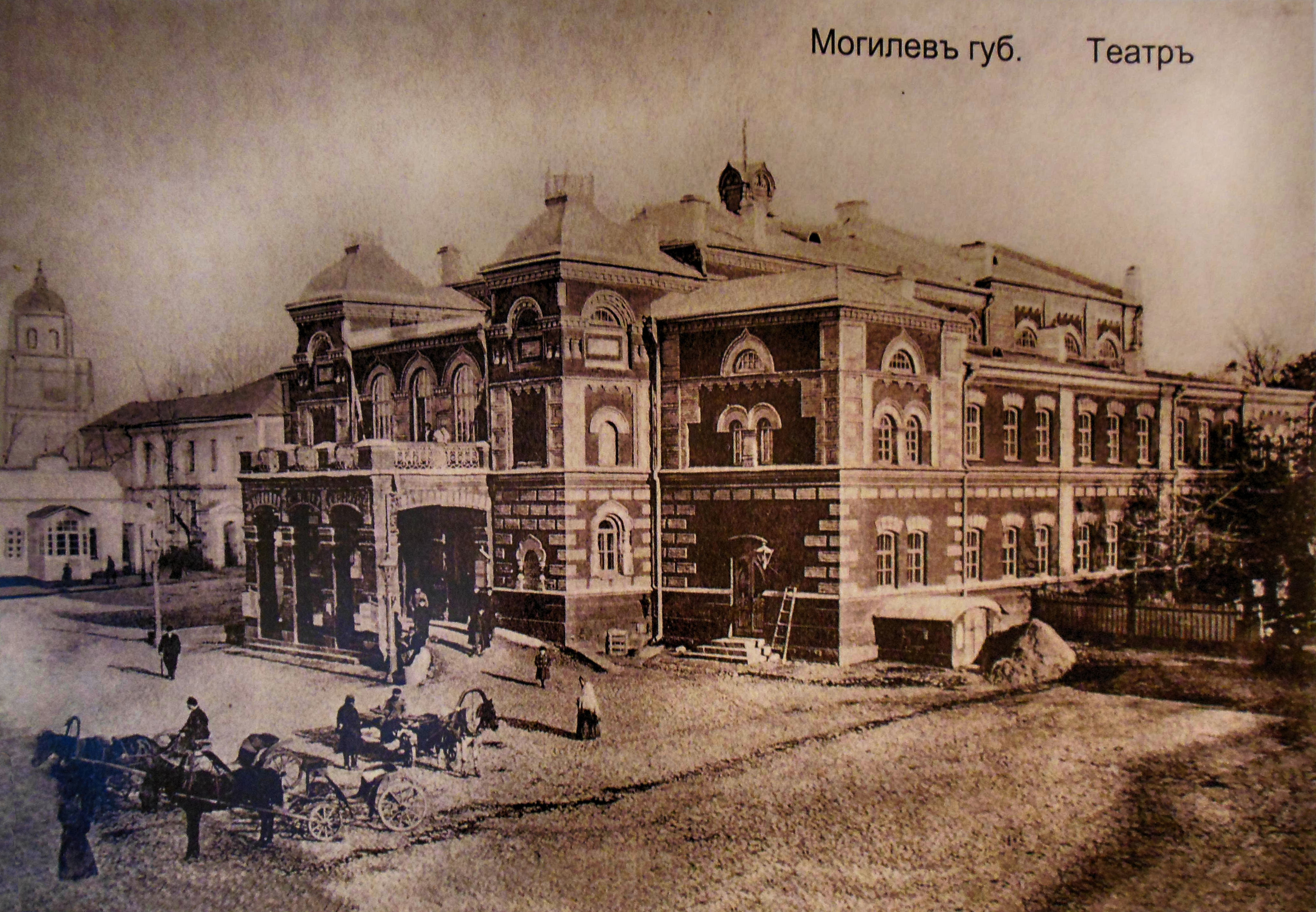 Беларуская (тарашкевіца): Будынак гарадзкога тэатра. г. Магілёў This is a photo of Belarusian heritage monument. Reference number: 513Г000585 ( WLM)